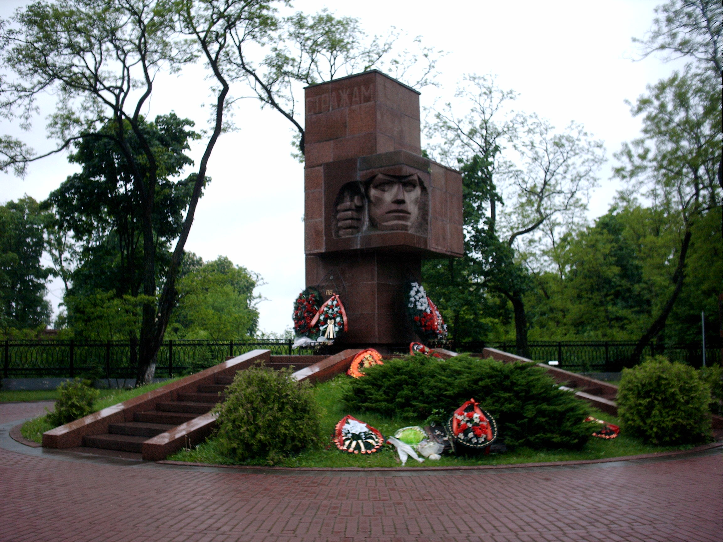 Brest Monument